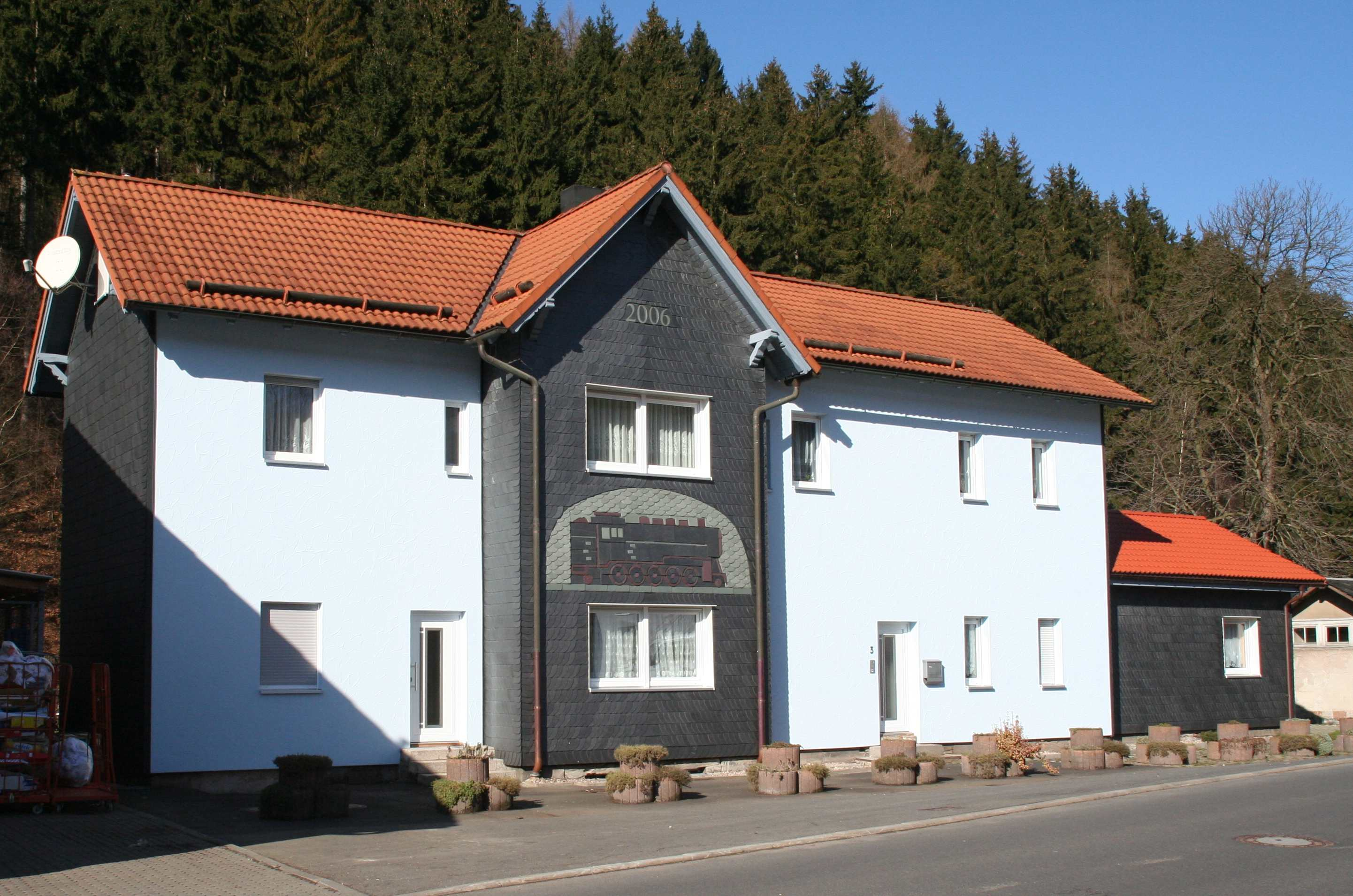 Ehemaliger Bahnhof Schönbrunns, Gemeinde Schleusegrund im Landkreis Hildburghausen